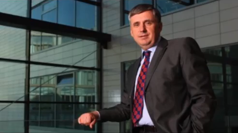 Ion Sturza